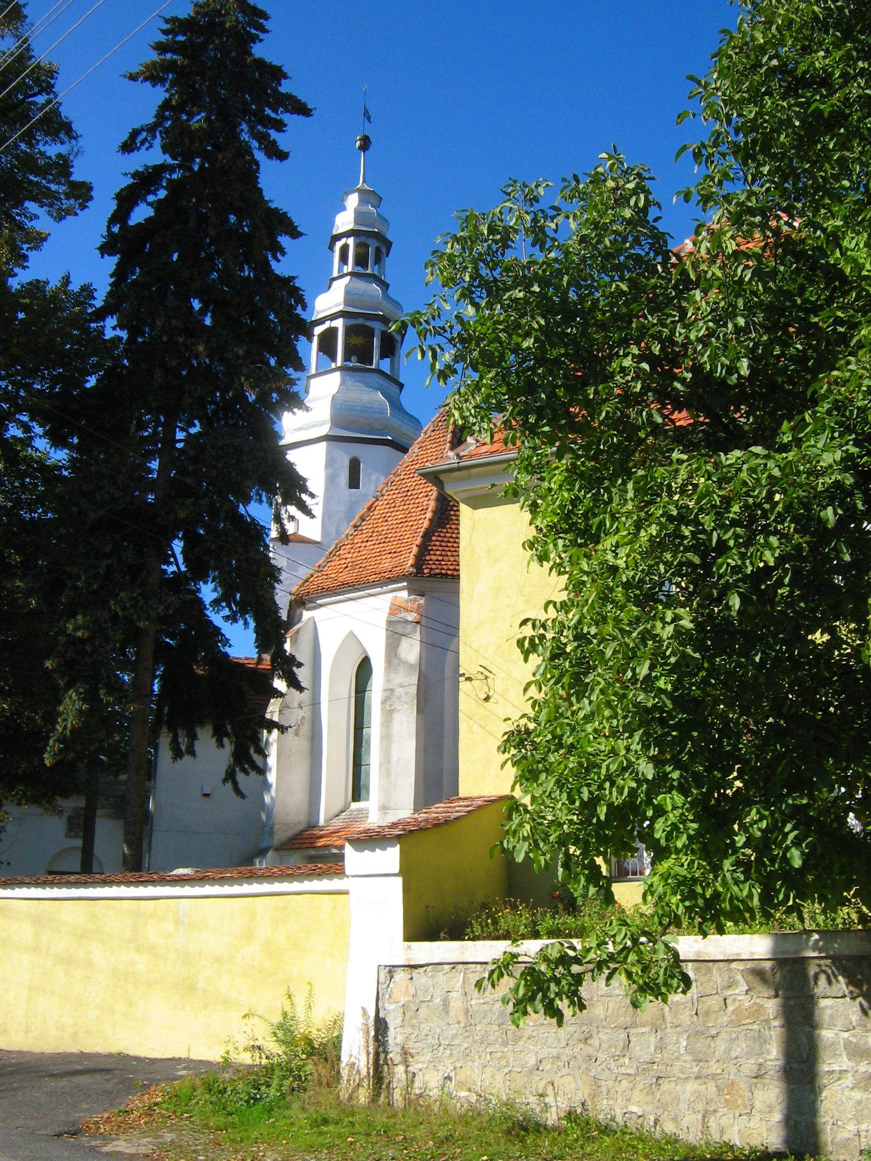 Kościół Wniebowzięcia NMP w Mierczycach (zabytek nr rejestr. A/2225/708)